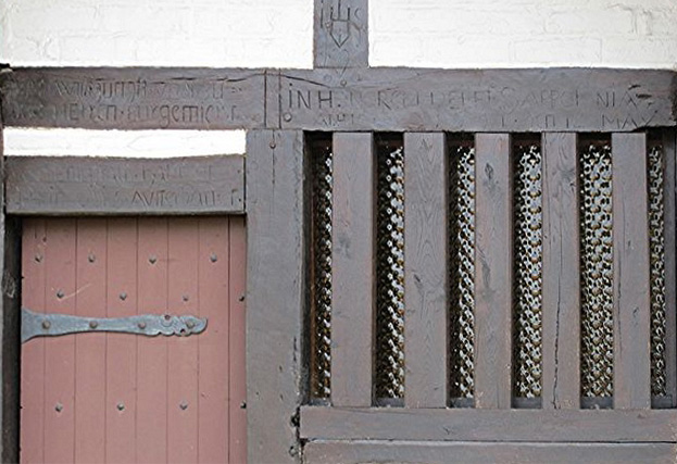 Ahrem Apolloniakapelle Balkeninschrift